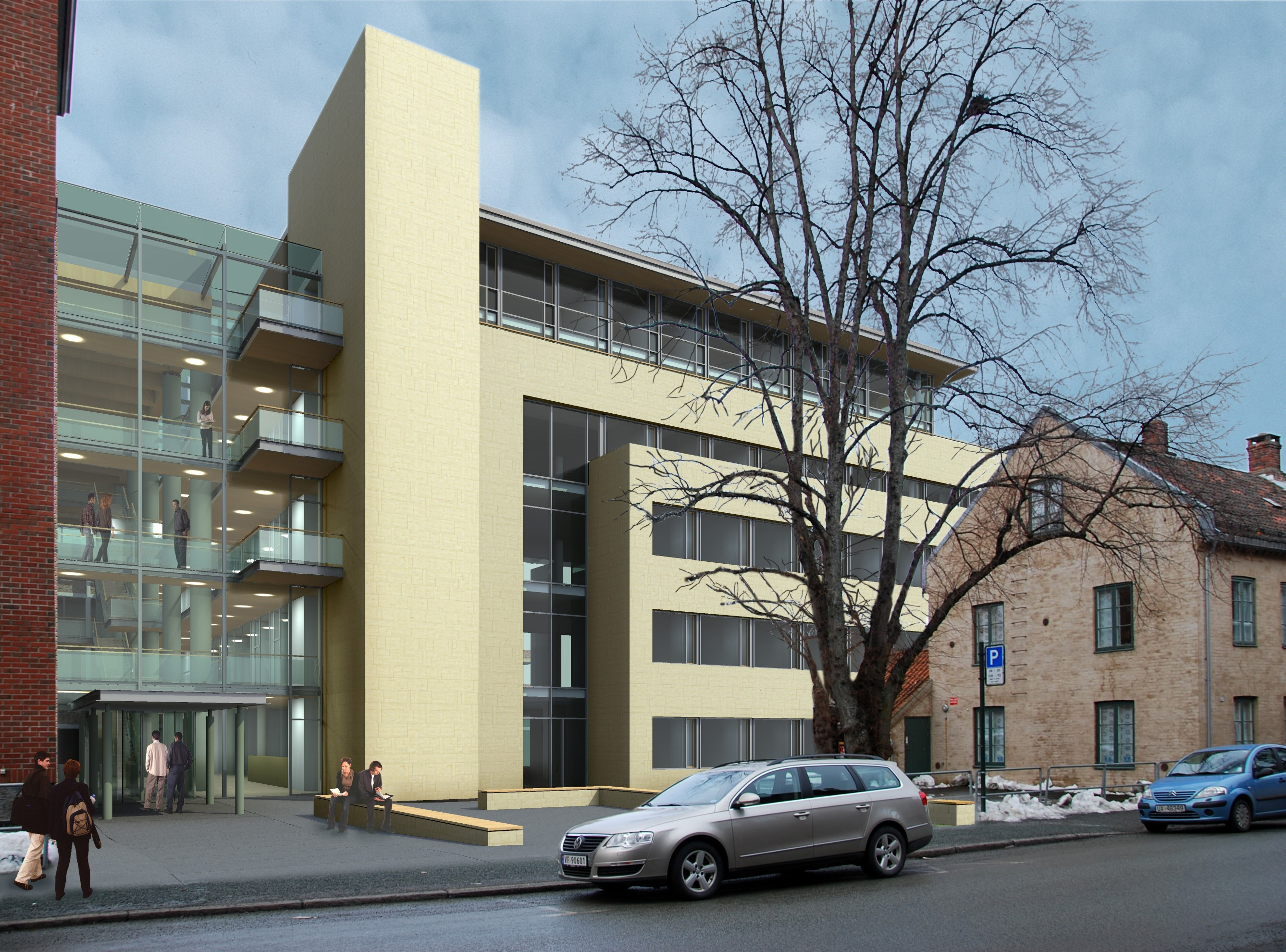 Teknologibygget fra øst